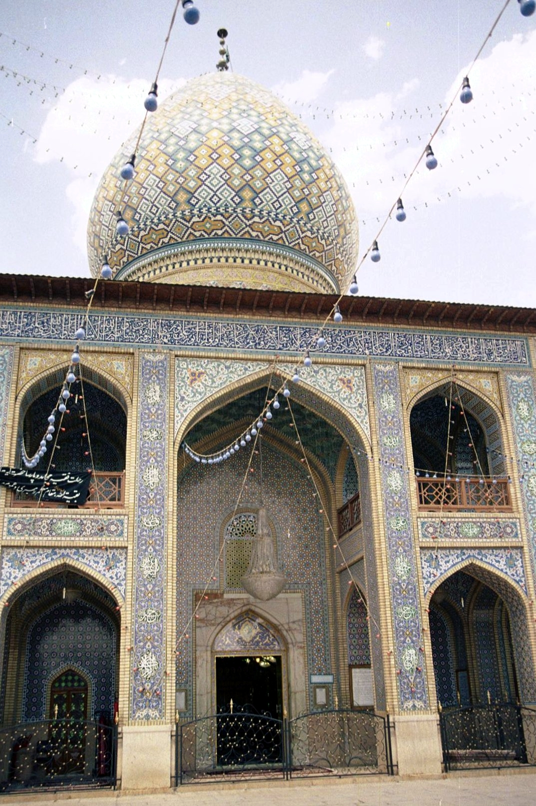 Nasir-ol-Molk Mosque, Shiraz, Iran